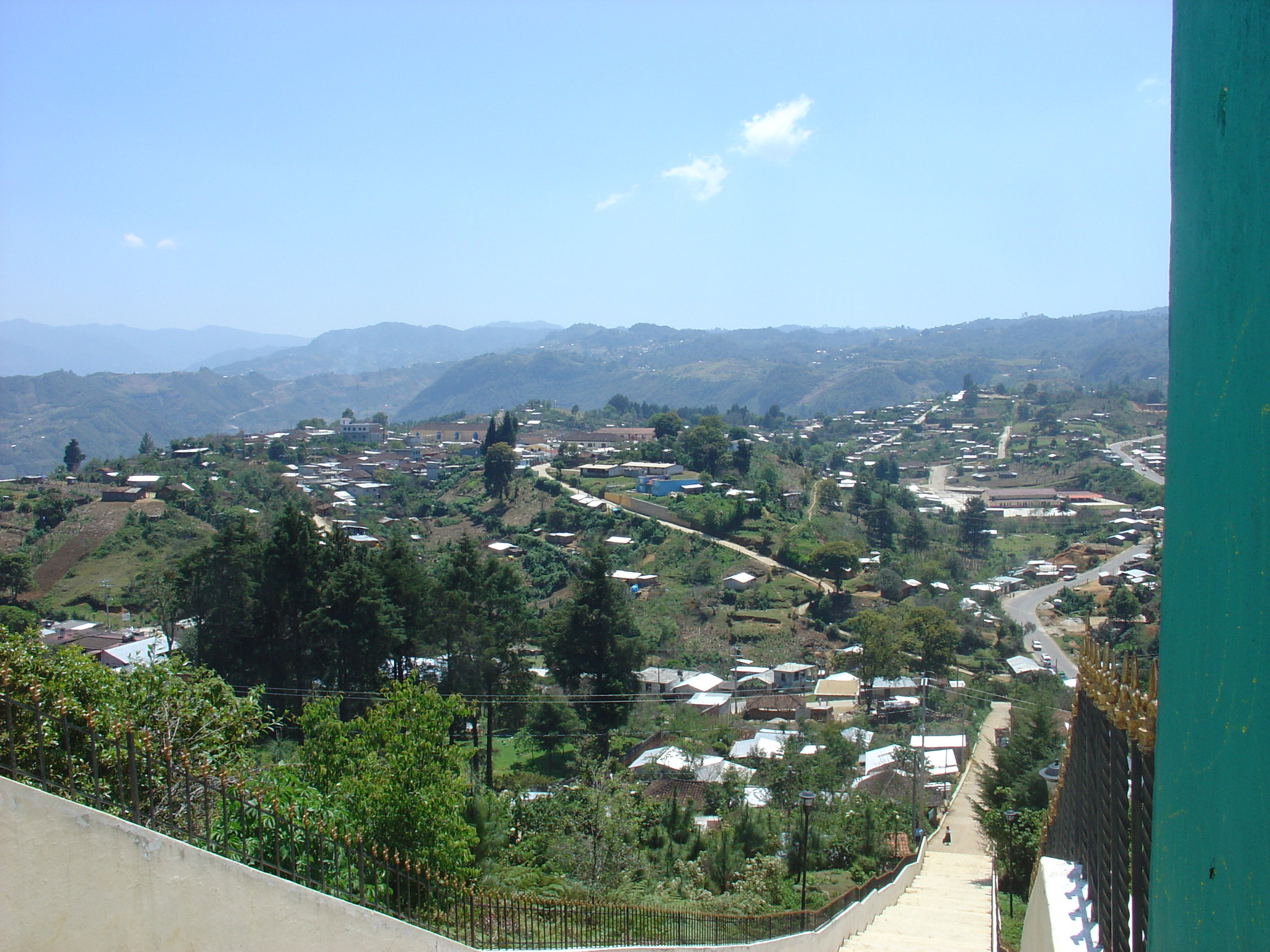 San Andrés Larraínzar desde la ermita de Guadalupe